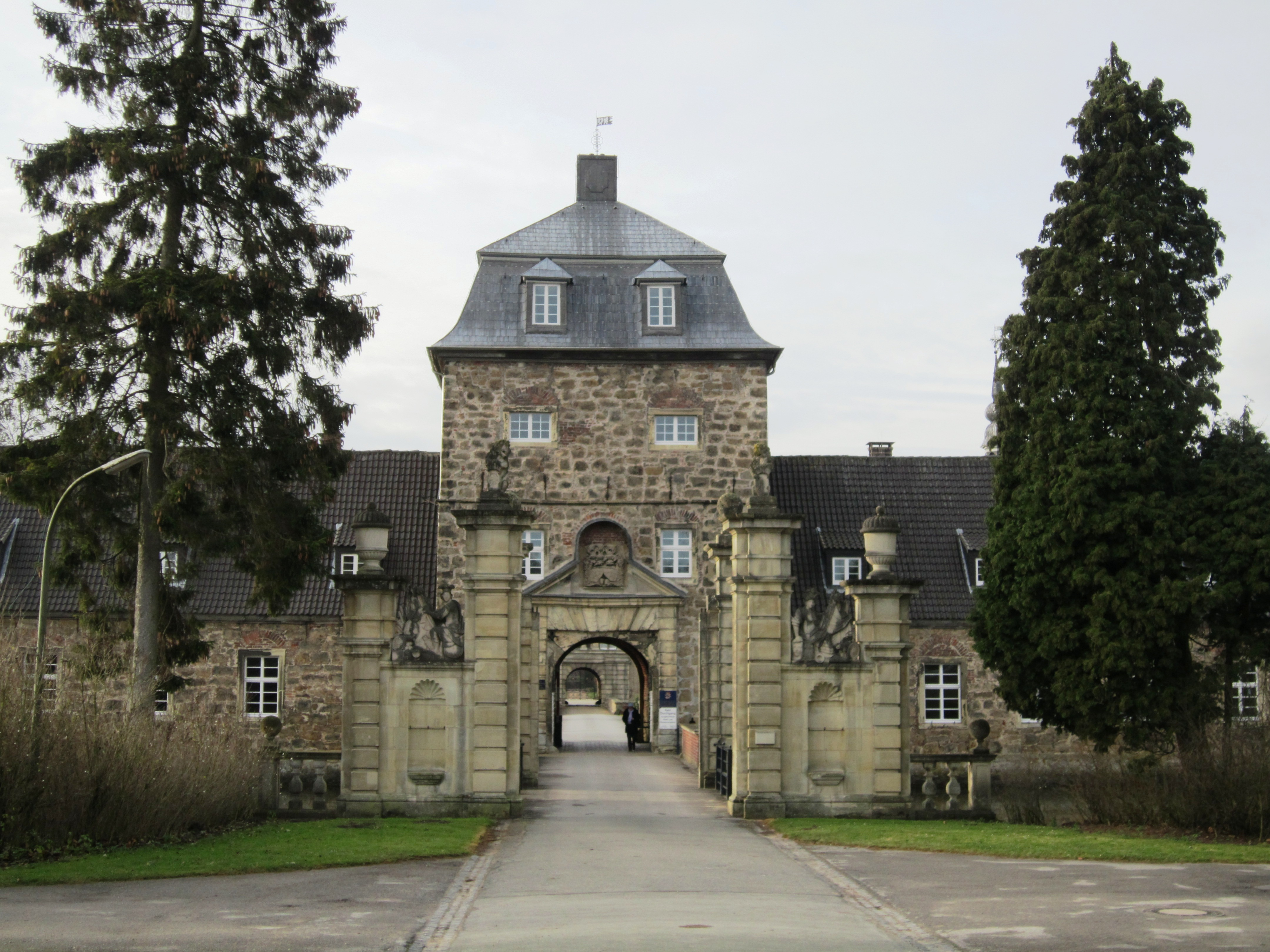 kasteel Lembeck